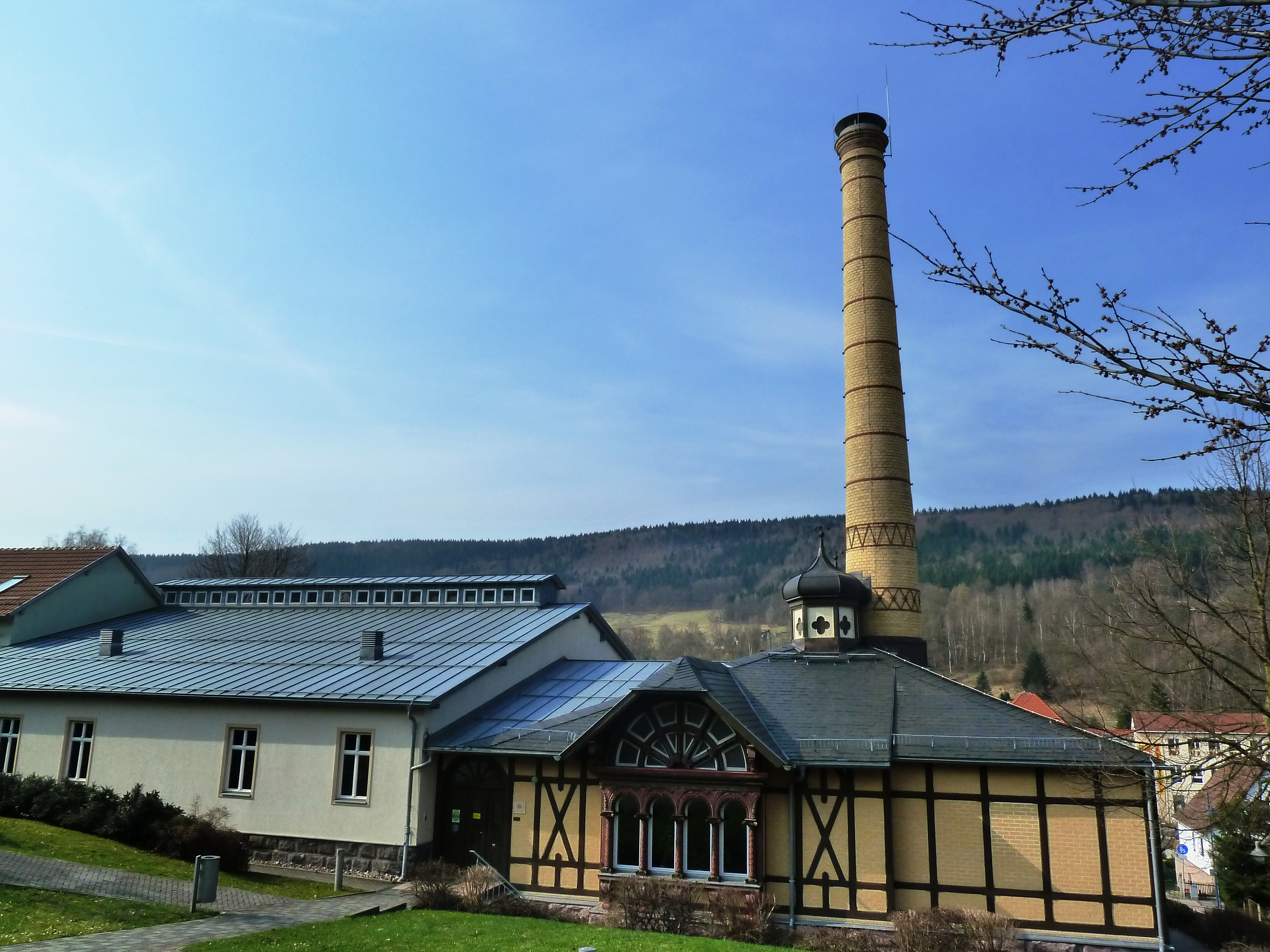 Stadtmuseum Zella-Mehlis Museum in der Beschussanstalt